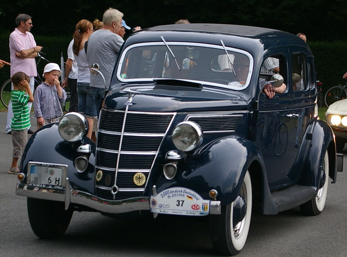 Description: Ford V8 Convertible. Picture taken during "2000 km durch Deutschland" source Benutzer:Kassander der Minoer